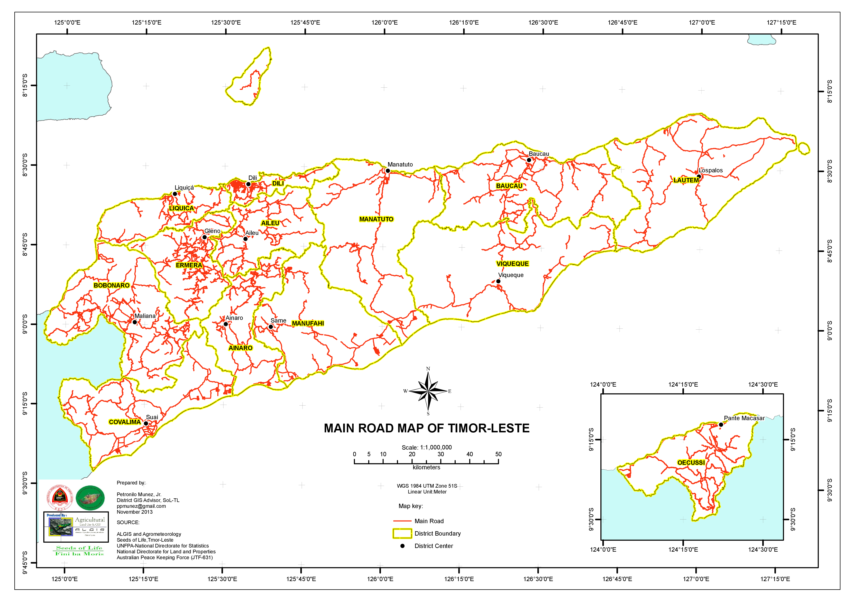 Straßenkarte Osttimors